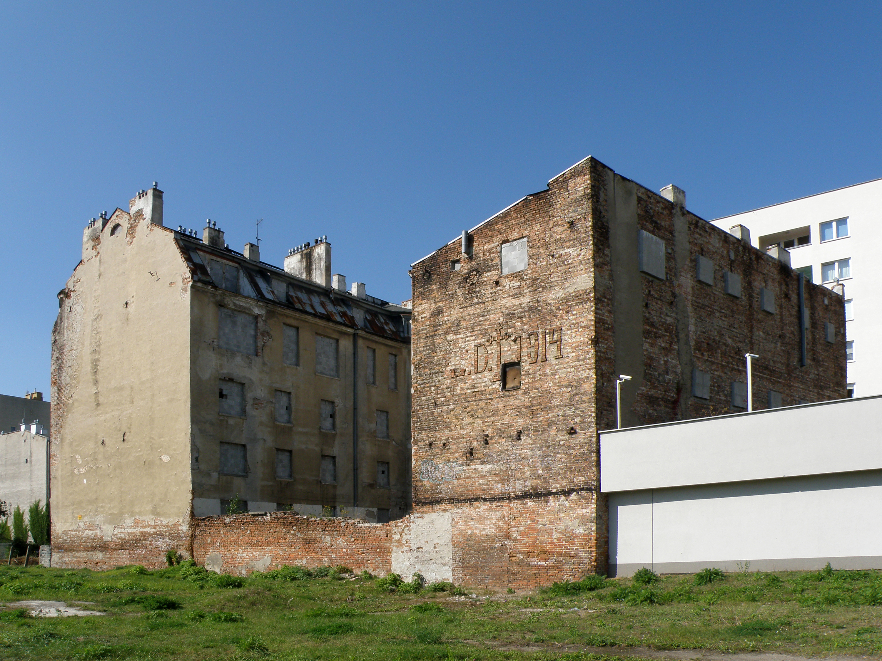 Kamienica z oficynami, 1914, ul. Chodakowska 22 w Warszawie (nr A-718 z 1.08.2006).